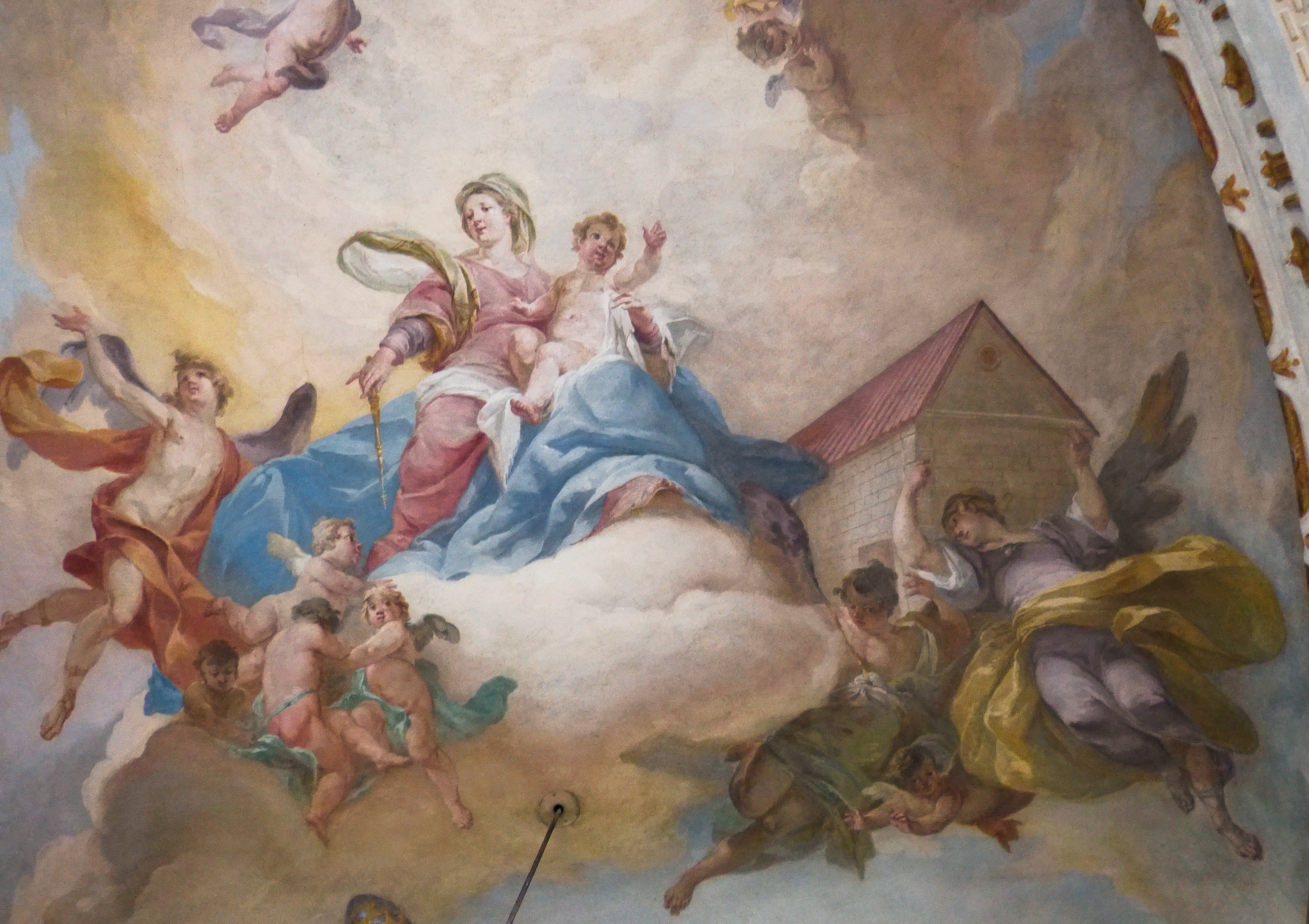 Ausschnitt aus dem Deckenfresco in der Beichtkapelle der Wallfahrtskirche St. Maria von Loreto auf dem Kobel in Westheim (Neusäß)